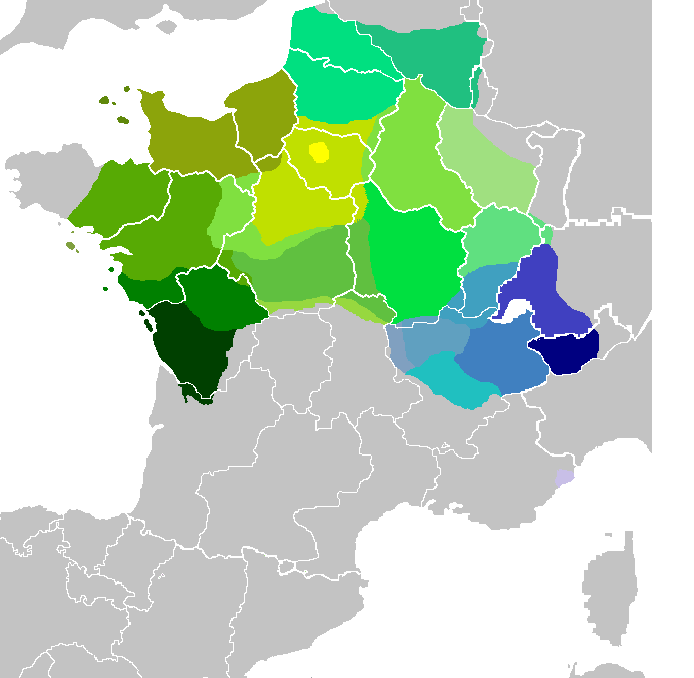 Lenguas galorromance: lenguas de oil y francoprovenzal.